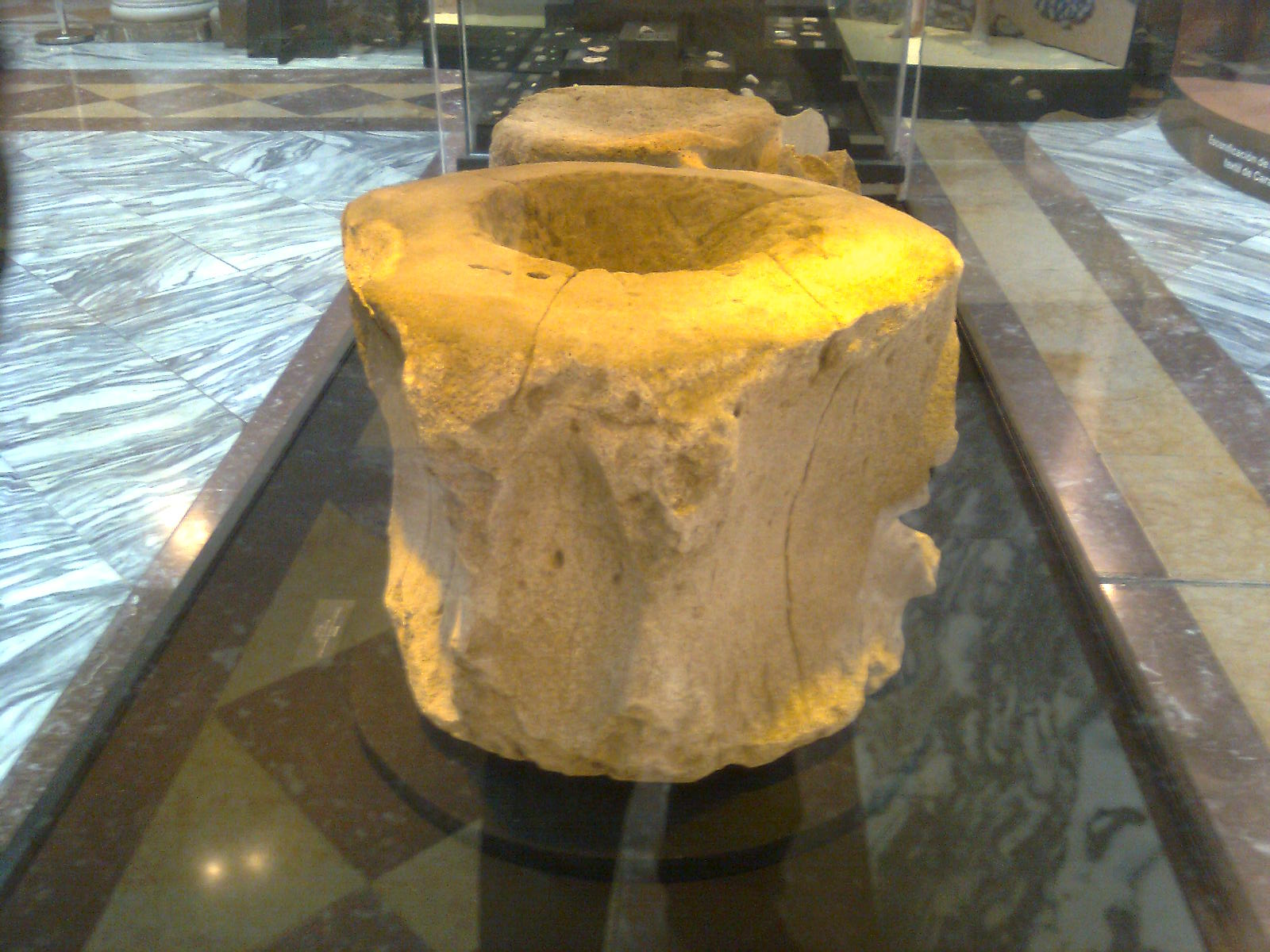 La ballena azul (Balaenoptera musculus) formó parte de la actividad cinegética de la civilización caralina. Vertebras usadas como asientos